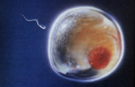 Ovulo siendo fecundado por espermatozoide. Esquema 3D. No respeta las proporciones. No se muestra corona radiada.